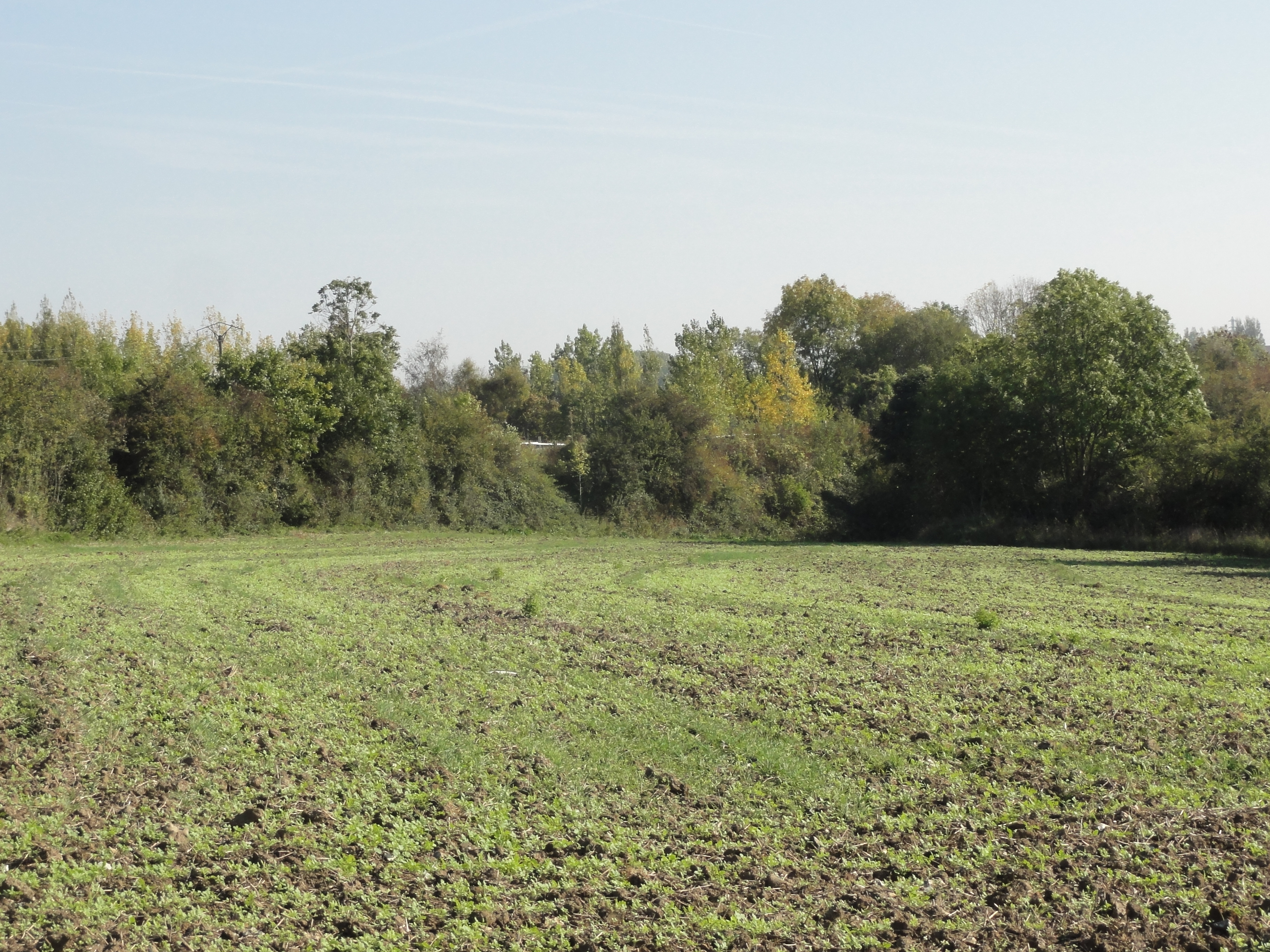 Terril n° 246 dit Cavalier du 4 ter au 7, Fosse nos 1 et 4 - 4 bis de la Compagnie des mines de Ferfay dans le bassin minier du Nord-Pas-de-Calais, Auchel, Pas-de-Calais, Nord-Pas-de-Calais, France.